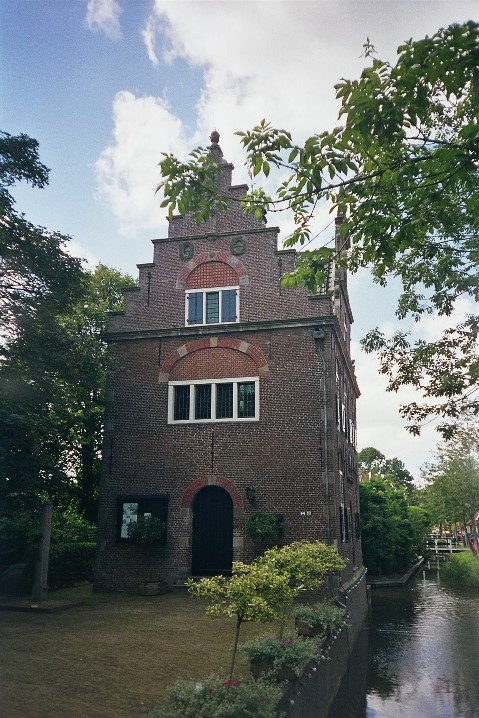 Foto van het voormalige raadhuis van Jisp. Foto gemaakt door uploader zelf op 28 augustus 2004.